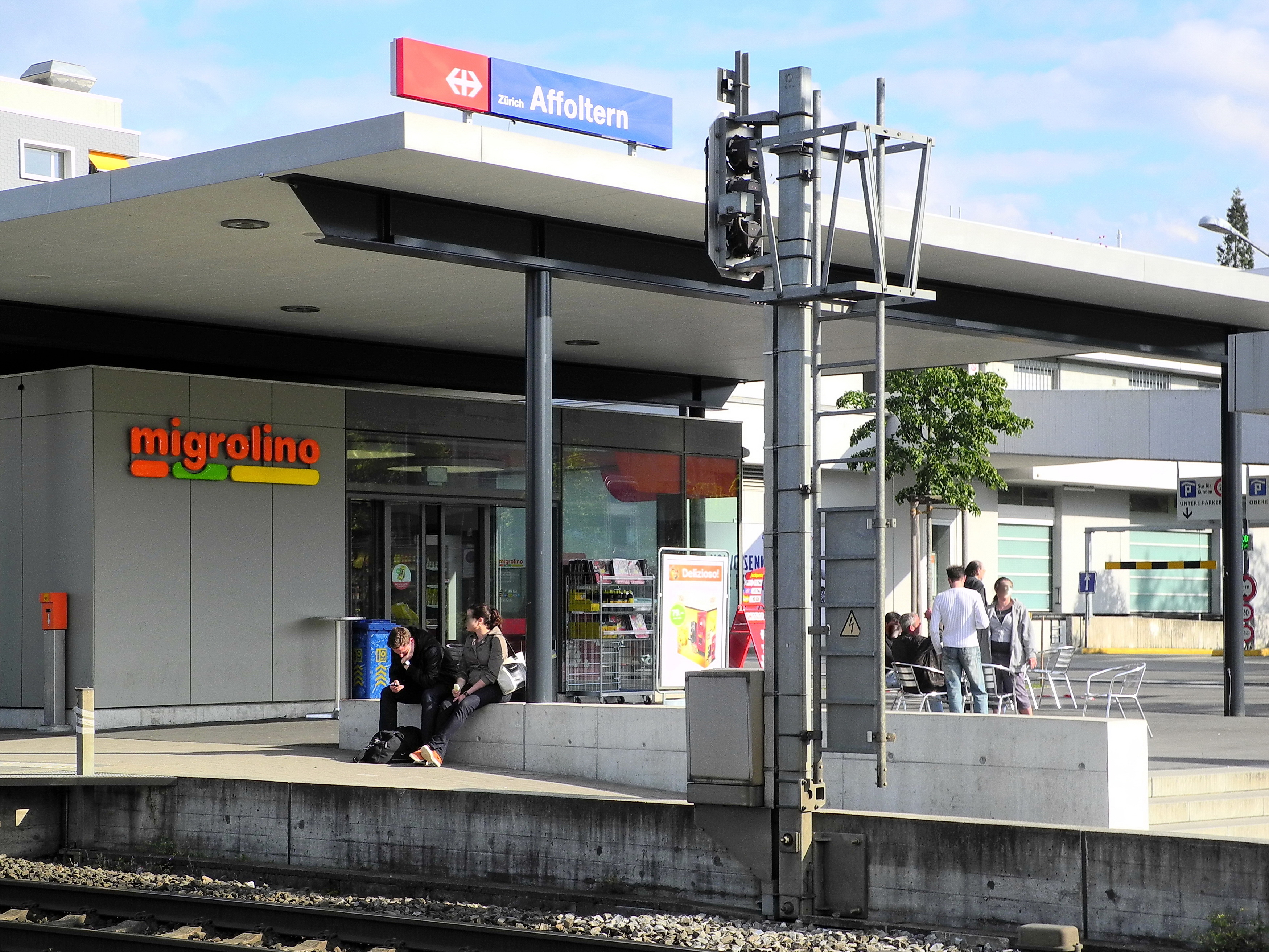 Migrolino, Bahnhof in Zürich-Unteraffoltern (Switzerland)